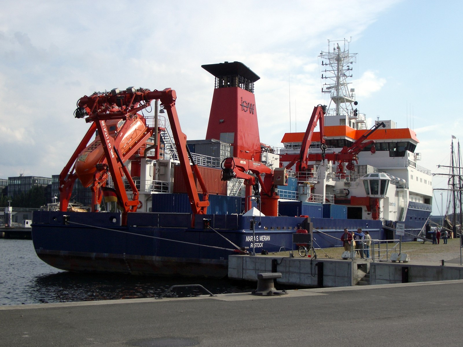 Heckansicht des Forschungsschiffs Maria S. Merian im Kieler Hafen.